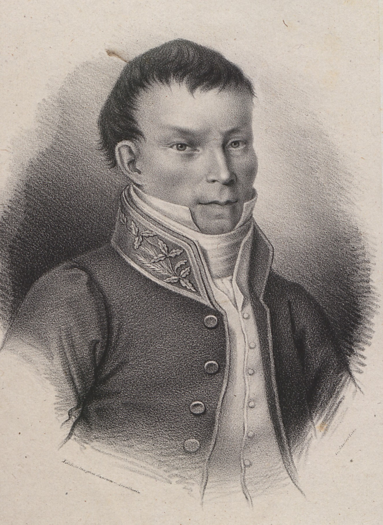 Alojzy Feliński, ok. 1837 r.